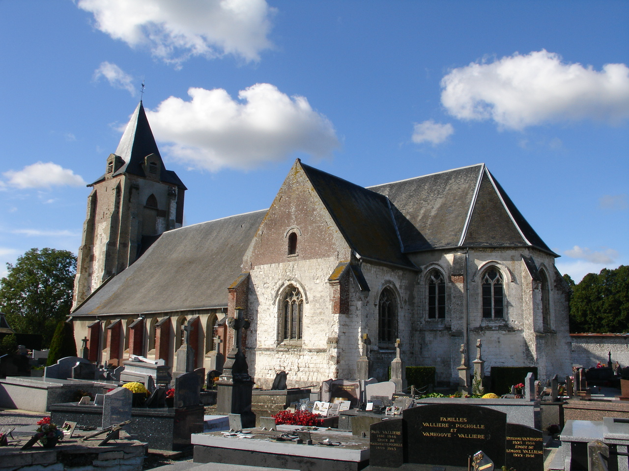 Église de Verton